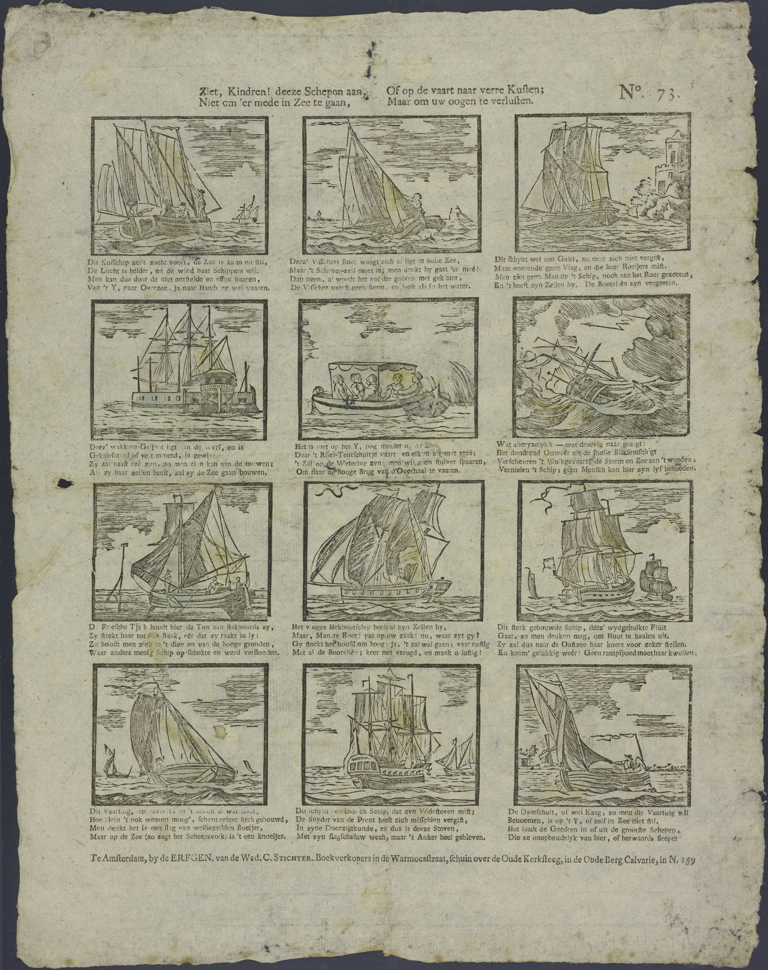 Centsprent met 4 x 3 houtsneden, met afbeeldingen van schepen: kofschip, vissersboot, galei, galjoot, roeiboot met tent, een schipbreuk, Friese tjalk, hekbootschip, fluit, boeier, een Indisch schip, een damschuit of kaag. Bevat vierregelige rijmende onderschriften.